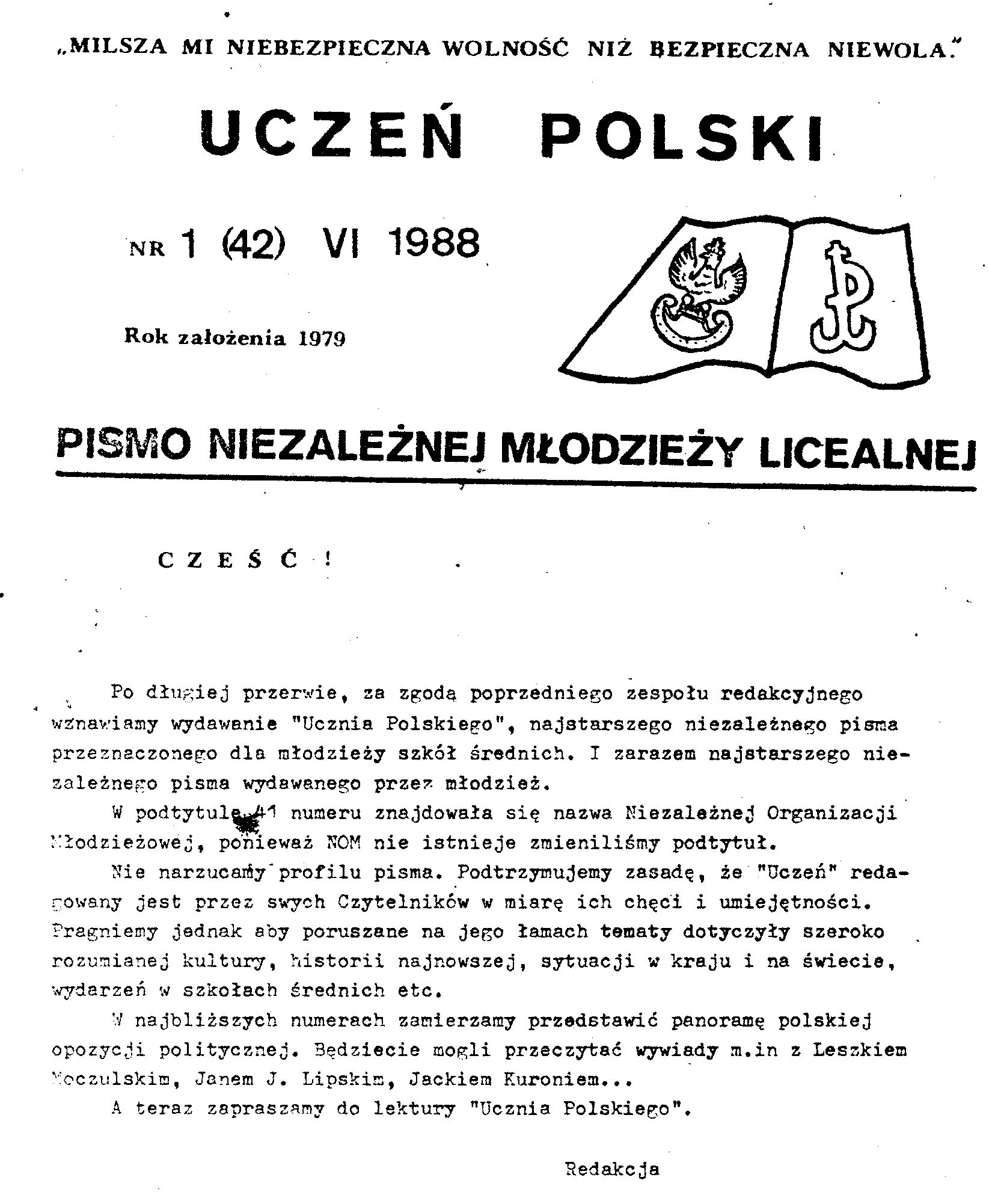 Pierwsza strona pierwszego numeru trzeciej serii "Ucznia Polskiego".